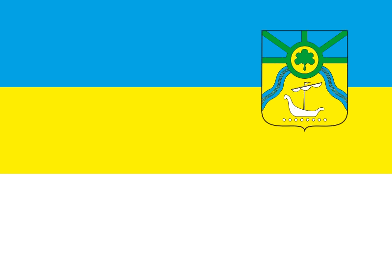 Ясинувата пр